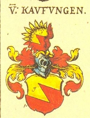 Coat of Arms, Kaufungen Family, Meissen Saxony (from: Johann Siebmacher: New Wappenbuch, scan from: Horst Appuhn, Johann Siebmachers Wappenbuch. Die bibliophilen Taschenbücher 538, 2. verb. Aufl , Dortmund 1989 Meißner, Blatt 153)